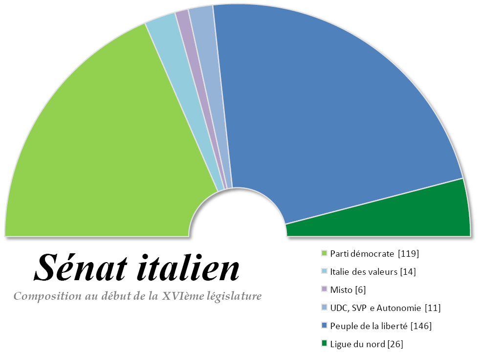 Composition du Sénat italien à l'ouverture de la XVIème législature. Répartition par groupes politiques.